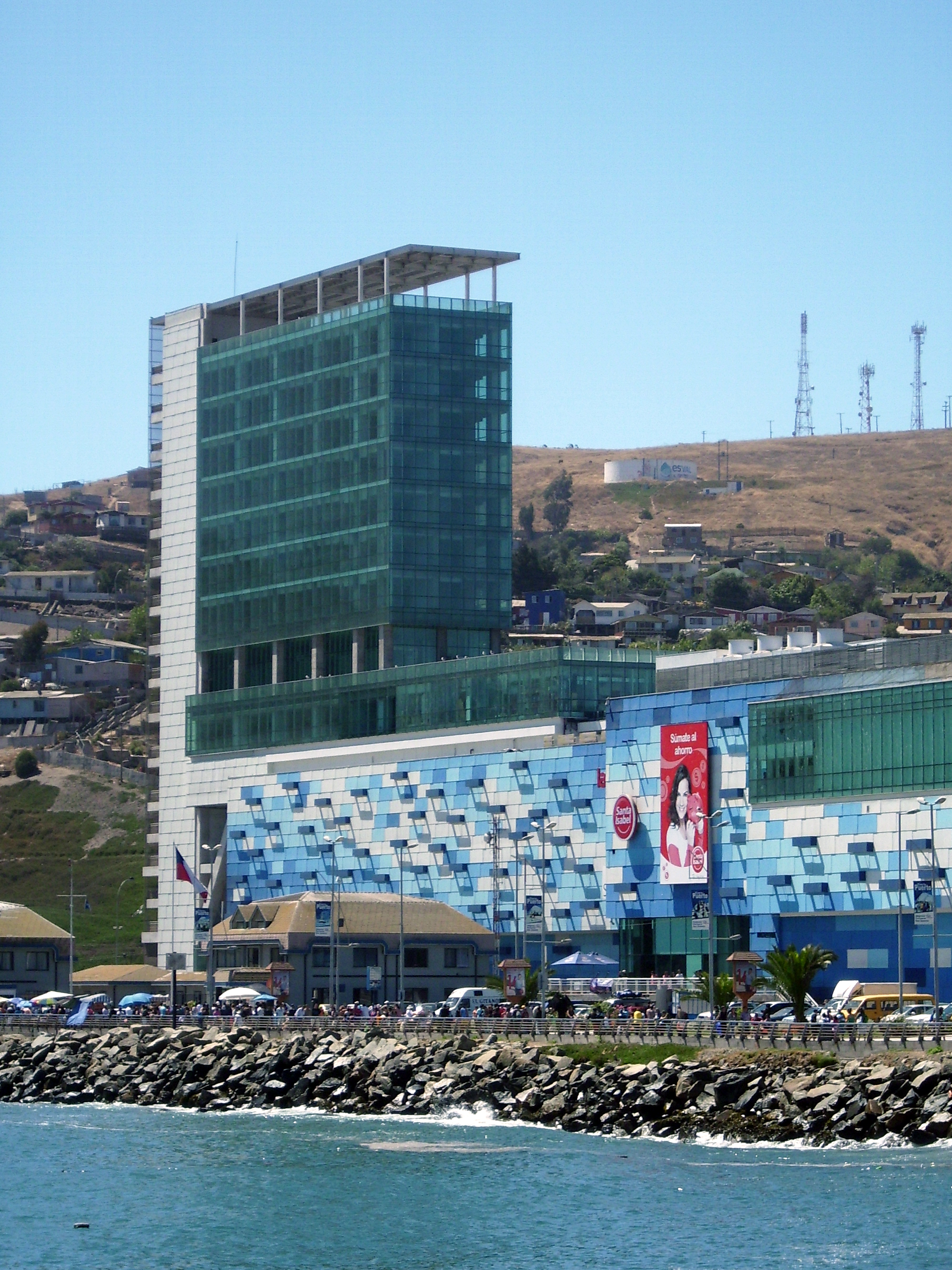 El mall Arauco San Antonio construido por la empresa Parque Arauco en el Puerto de San Antonio. V Región de Valparaíso, Chile.